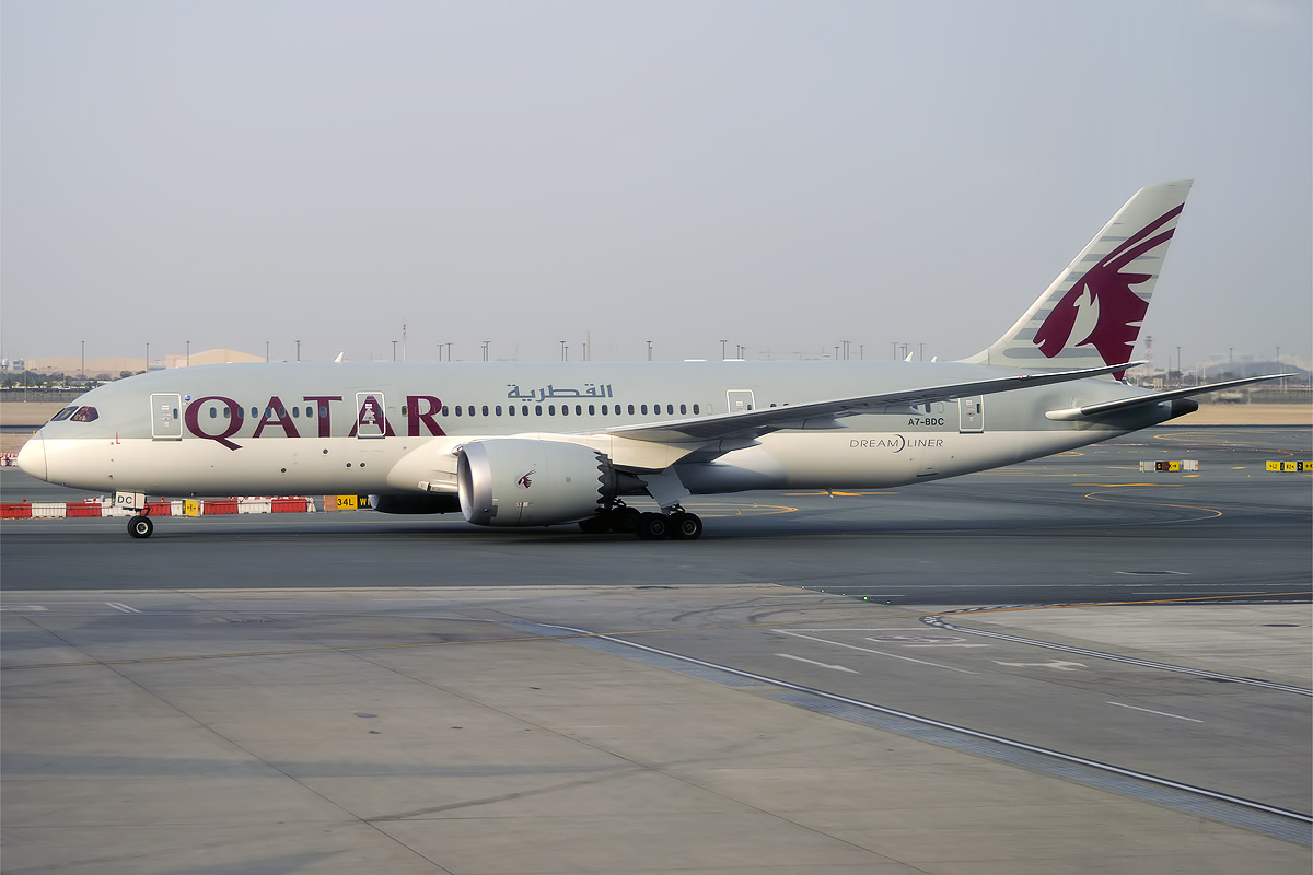 Qatar Airways, A7-BDC, Boeing 787-8 Dreamliner